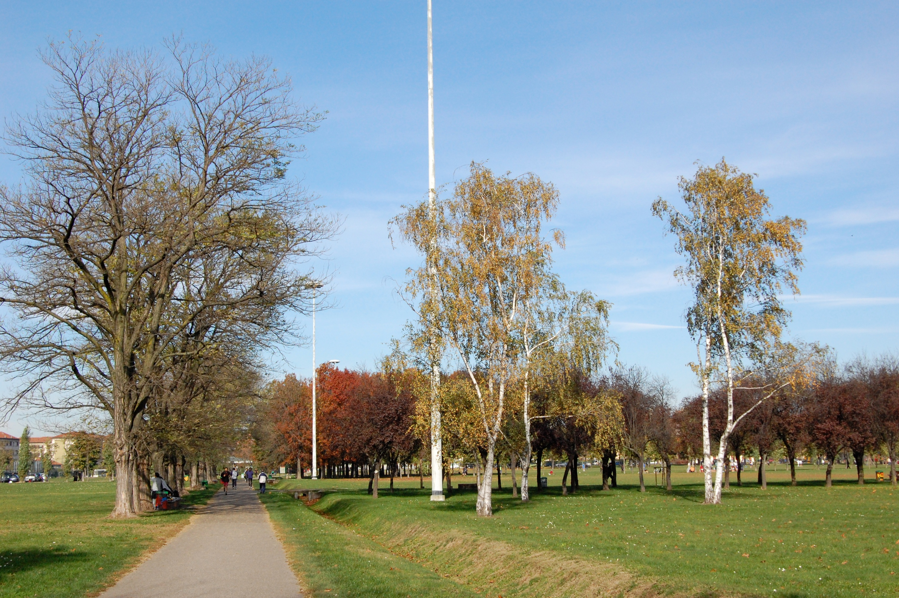 Parco di Trenno, Milano Italia. Differenti alberazioni presenti.